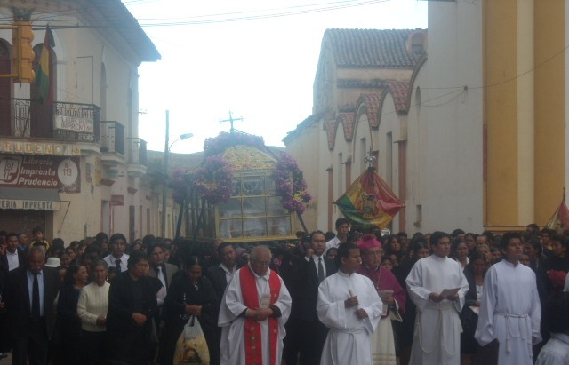 Procesión del Santo Sepulcro acompañado del equipo sacerdotal a la cabeza del Monseñor en la Ciudad de Punata.